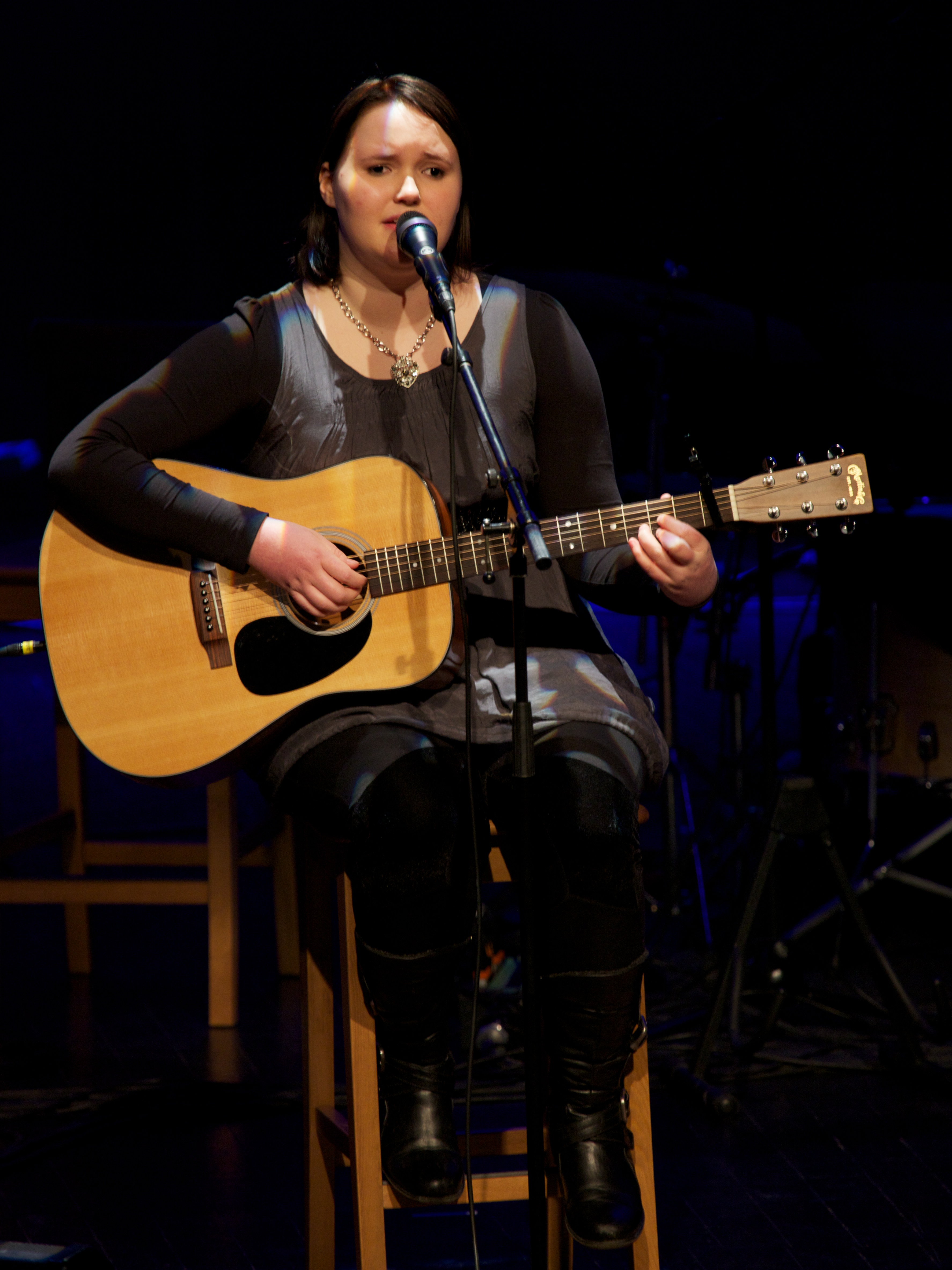 Sanger og låtskriver Elin Gaustad i Skien.